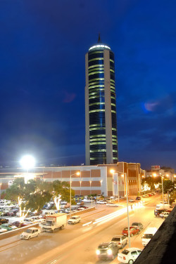 Das 42 stöckige Gebäude in Konya.